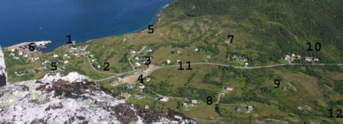 Rødsandbygda sett fra Stortinden, med nummererte punkter i landskapet.